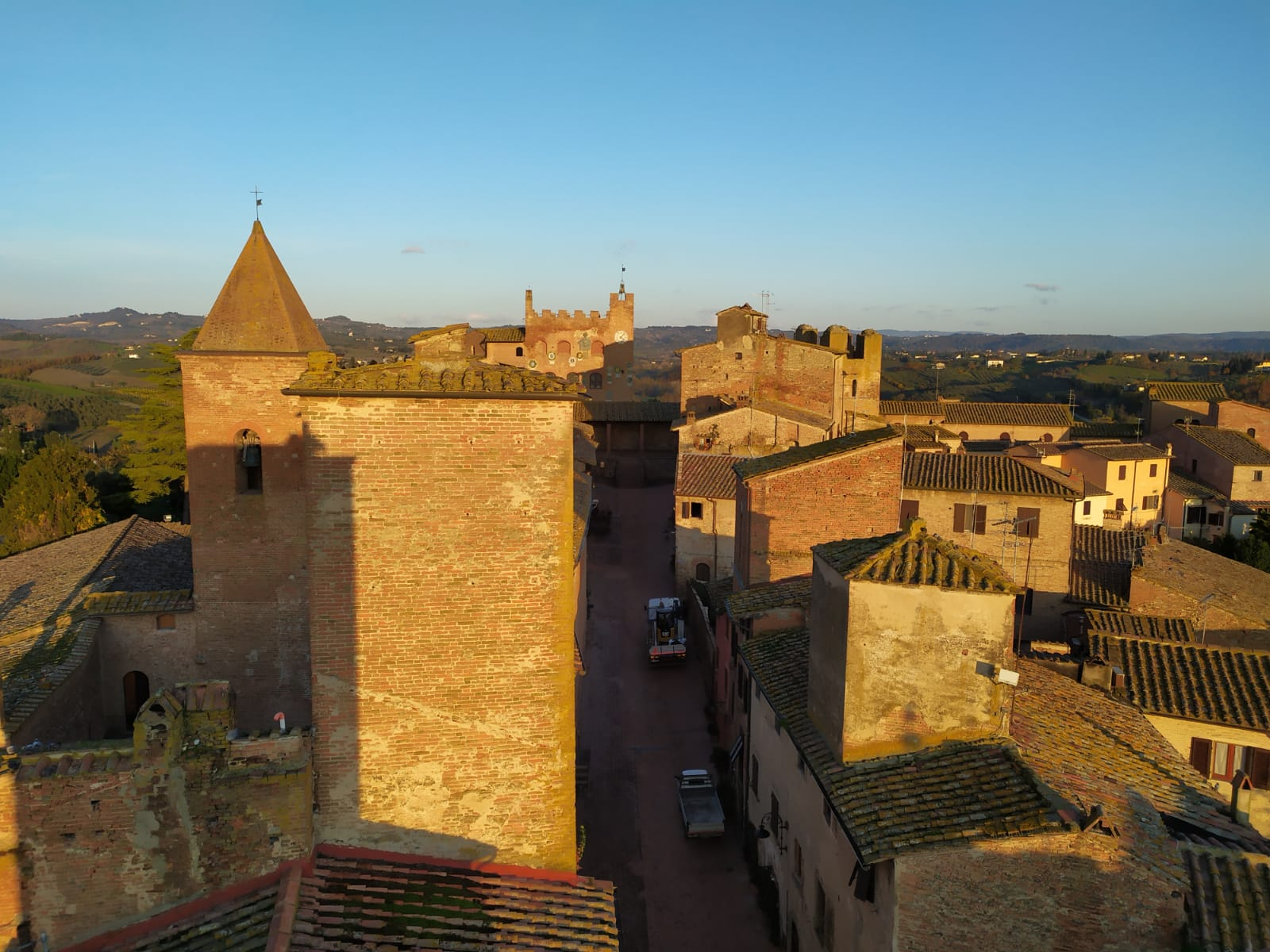 Veduta di Certaldo dalla torre di casa Boccaccio